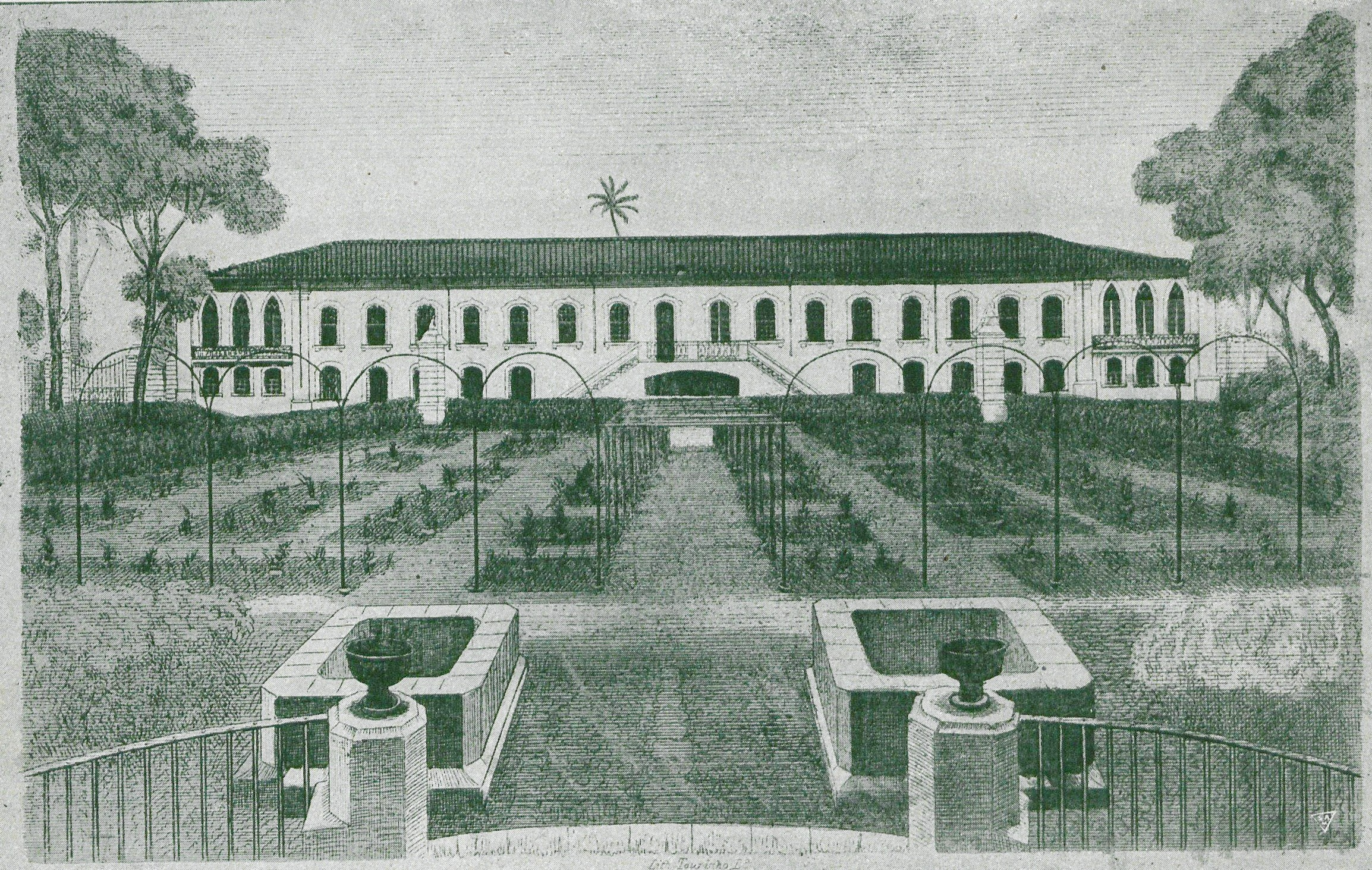 O "Ginásio Baiano" fora fundado em Salvador no ano de 1858 pelo futuro Barão de Macaúbas, Abílio César Borges; em 1871 este o transferiu para o cônego João Nepomuceno Rocha que mudou o nome para "Colégio São José"; em 1876 uma nova mudança de proprietário, adquirido por João Florêncio Gomes, deu-lhe a denominação final de "Ginásio São José". Era, ao seu tempo, o mais antigo colégio particular da capital baiana.Litografia publicada em 1919 pela revista "Bahia Illustrada", do Rio de Janeiro.